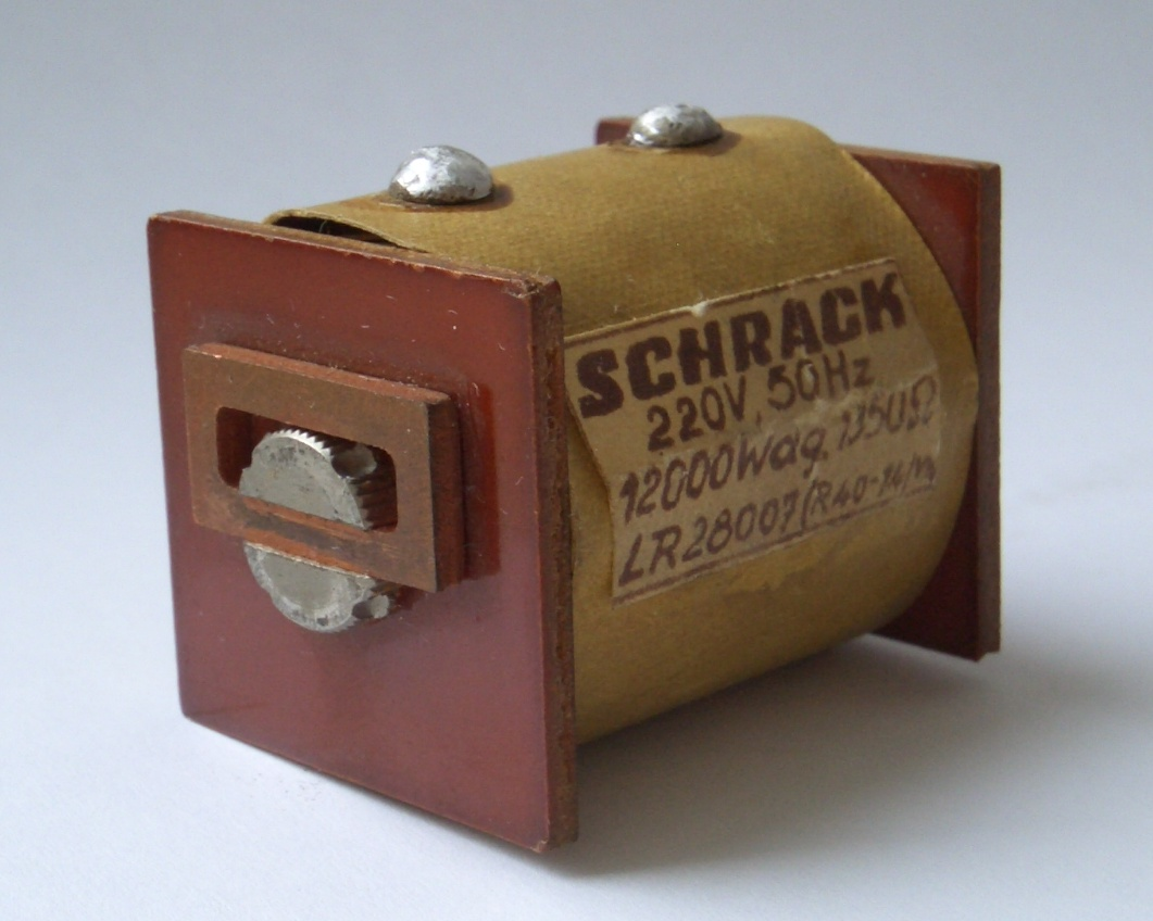 Nahaufnahme eines Zugmagneten mit Spaltpol in Form einer Kurzschlusswindung im vorderen Bereich. Für den Betrieb an Wechselspannung 220 V / 50 Hz